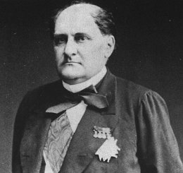 Napoleon Jozef Karel Paul Bonaparte.